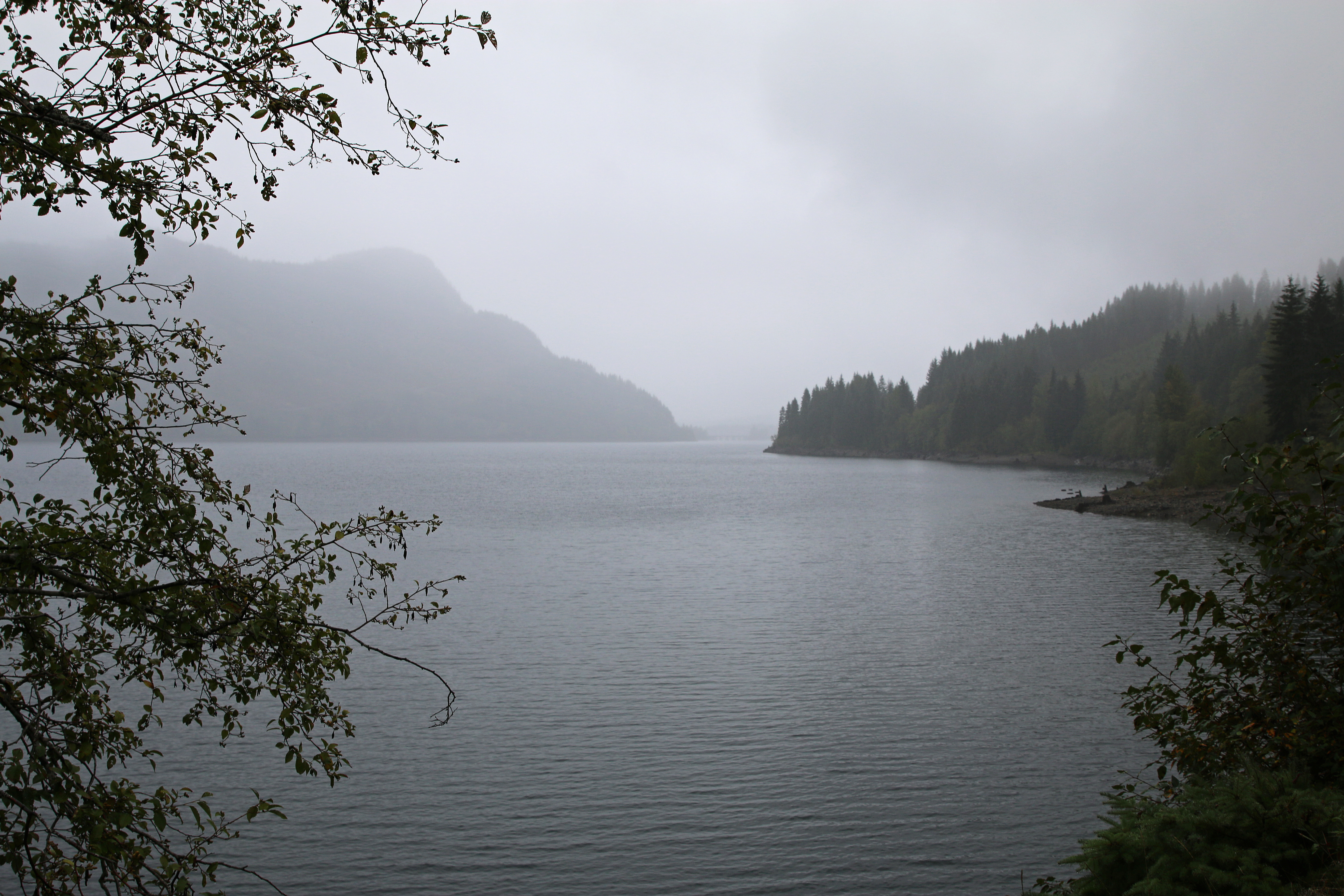 Küste von Vancouver island bei Tofino